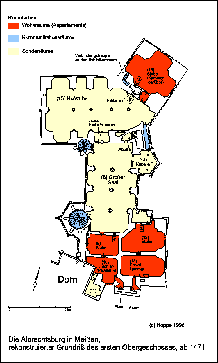 Albrechtsburg, Rekonstruktion der Raumfunktionen des ersten Obergeschosses um 1500, nach Hoppe 1996